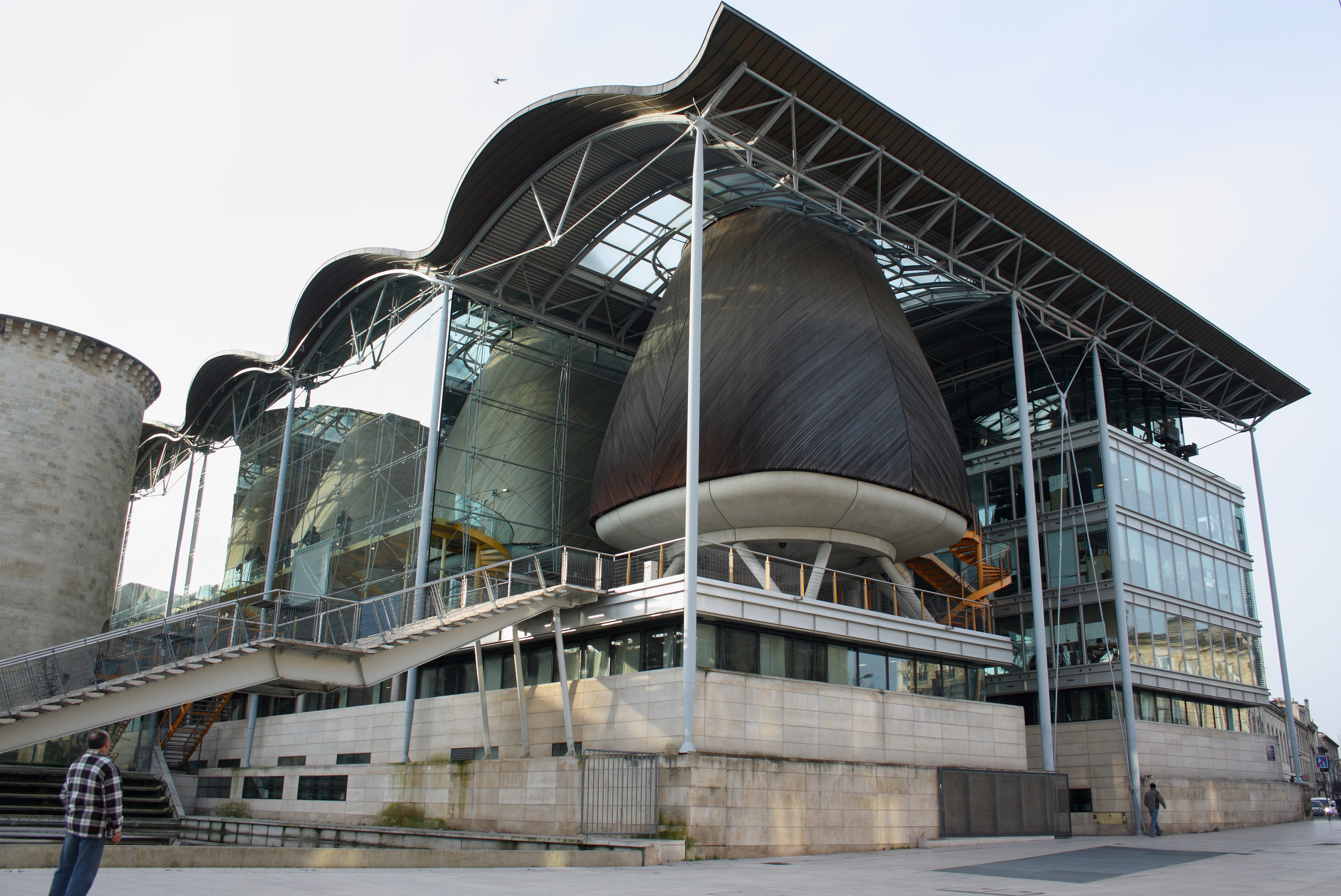 Tribunal de Grande Instance des Palais de Justice (Justizpalast) von Richard Rogers (1997) in Bordeaux (Region Aquitanien, Frankreich)